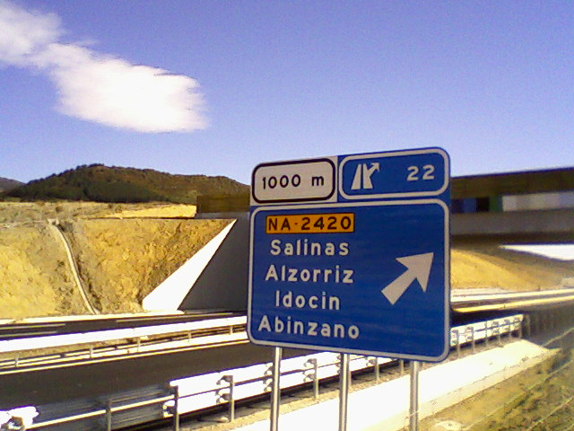 Autovía del Pirineo A-21 Salinas de Ibargoiti (Navarra)